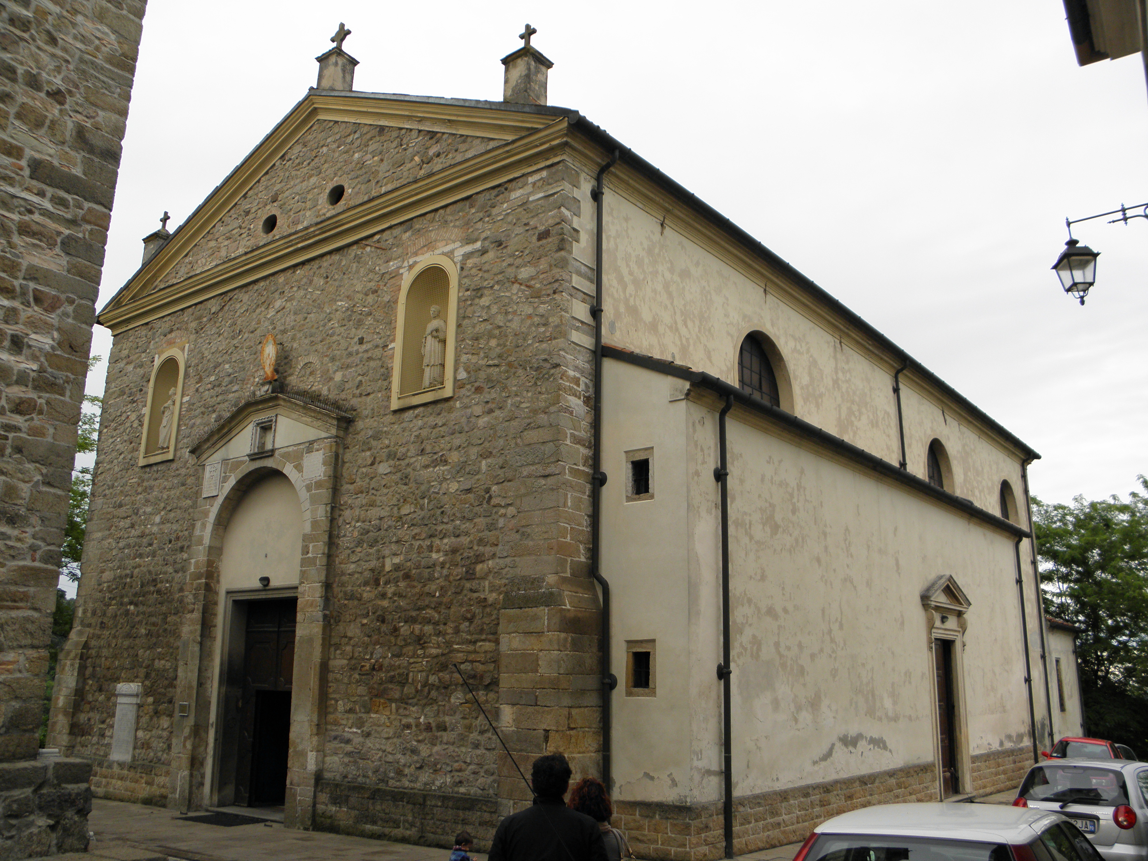 Teolo, la chiesa parrocchiale di Santa Giustina.